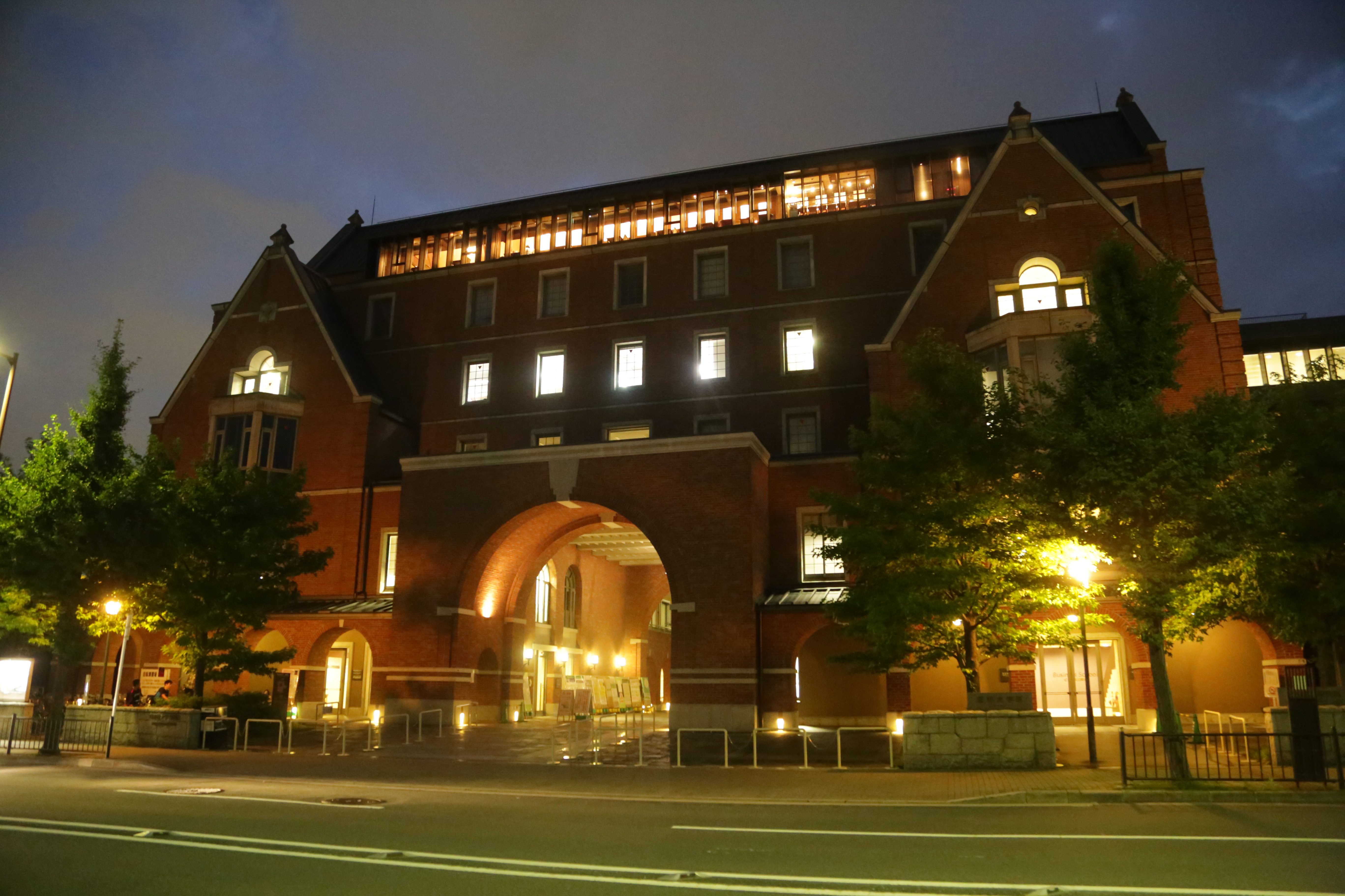 同志社大学寒梅館の外観（夜景）